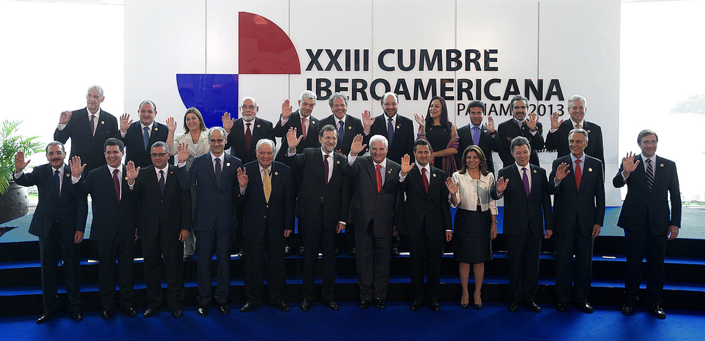 XXIII Cumbre Iberoamericana de Jefes de Estado y/o de Gobierno. Ciudad de Panamá, Panamá. 18 de octubre de 2013.